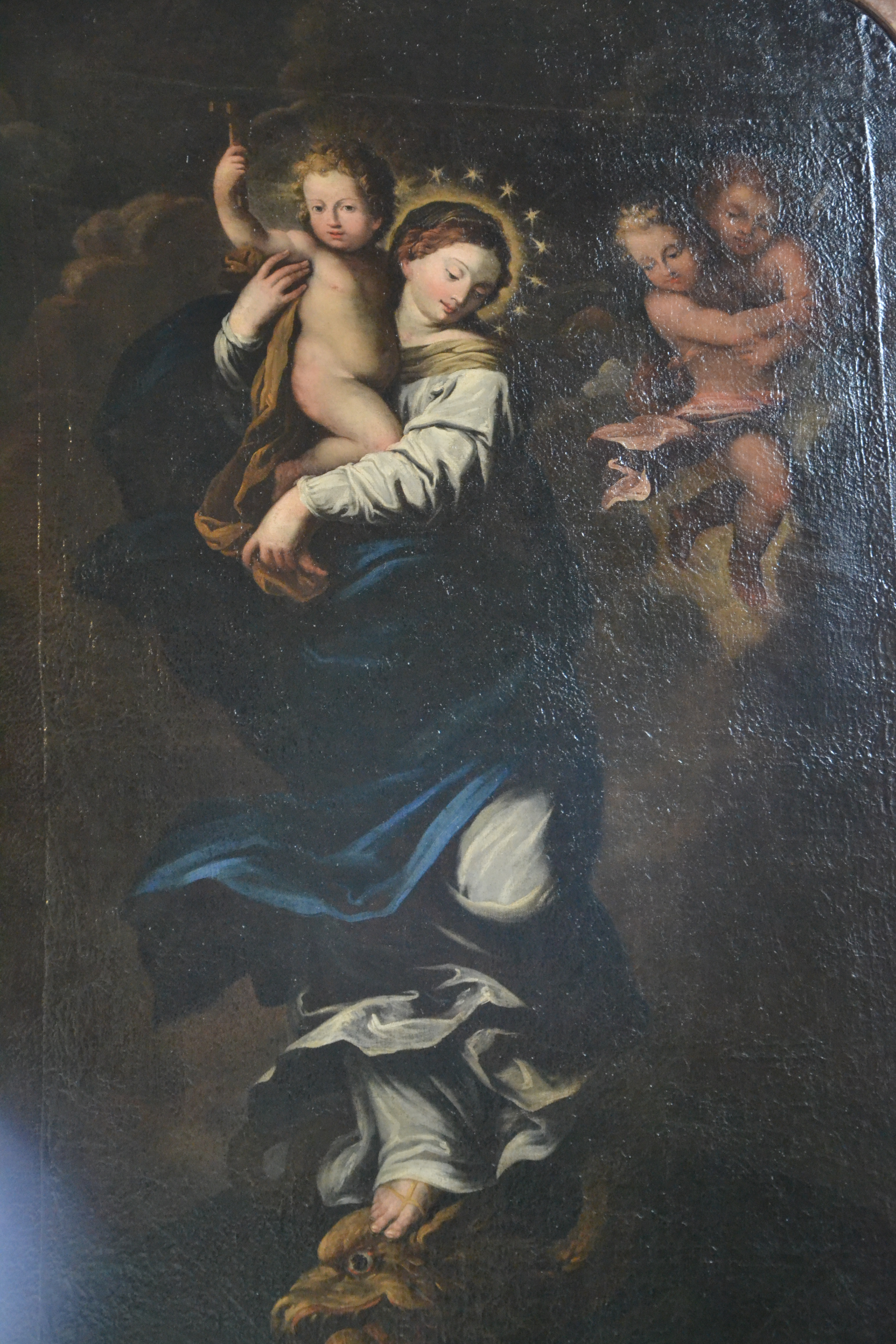 Santa Maria di Canepanova (Pavia) (1492 - sec. XVII)